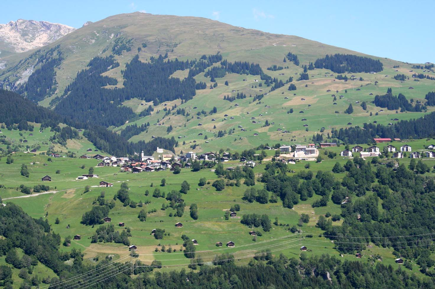 Brigels